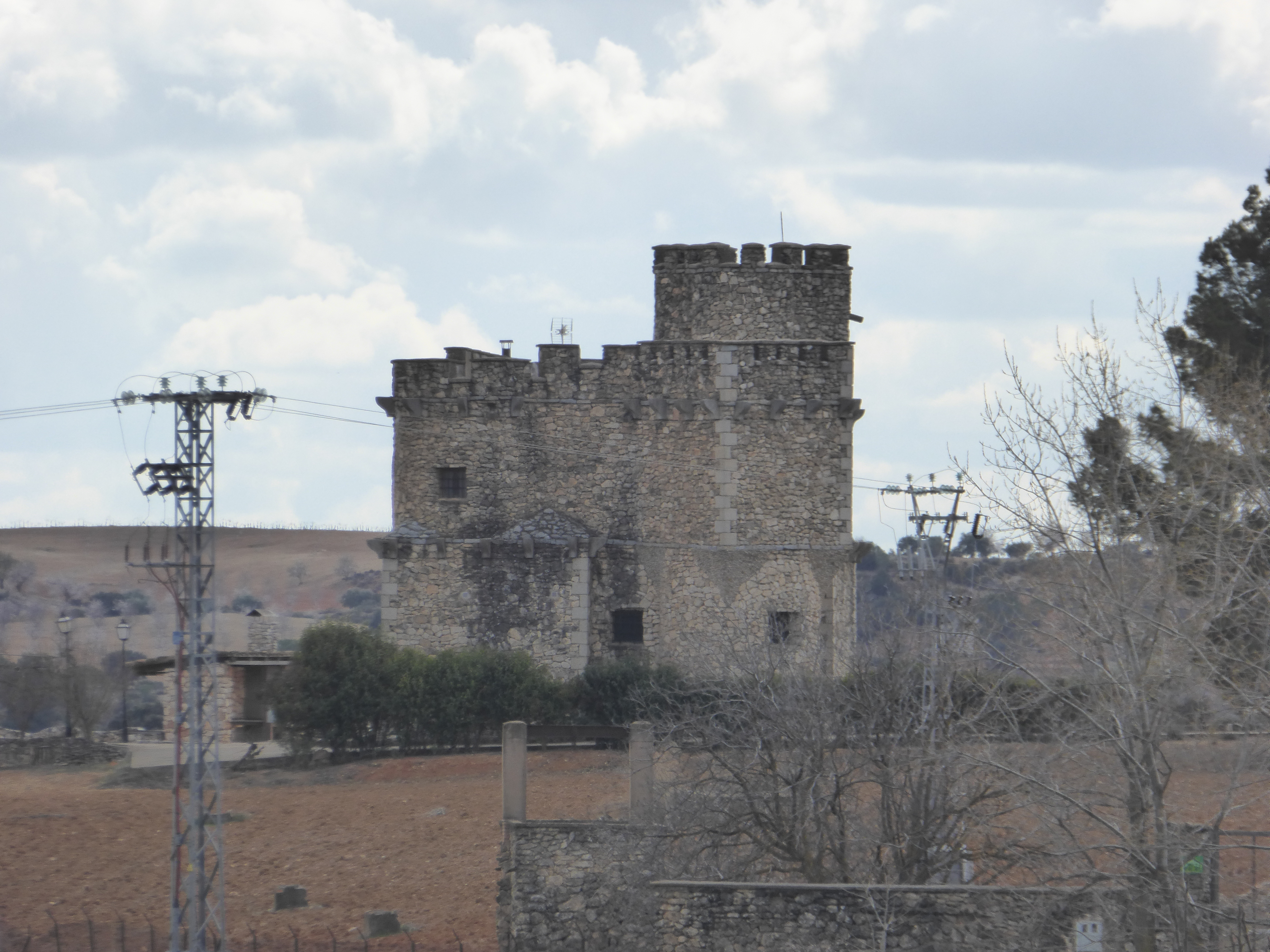 Buenache de Alarcón